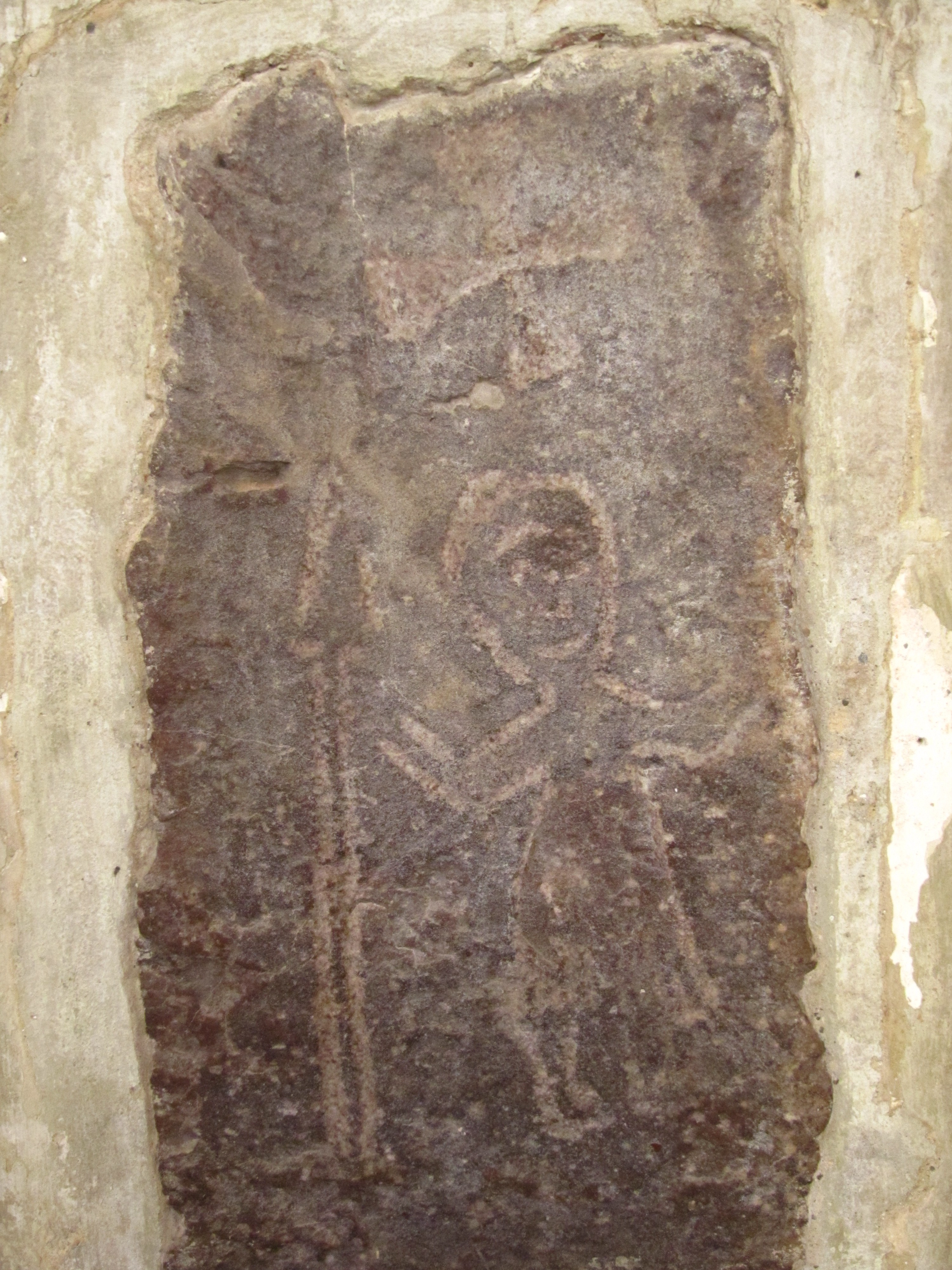 Bildstein (sogenannter Gerovitstein) in der St.-Petri-Kirche in Wolgast